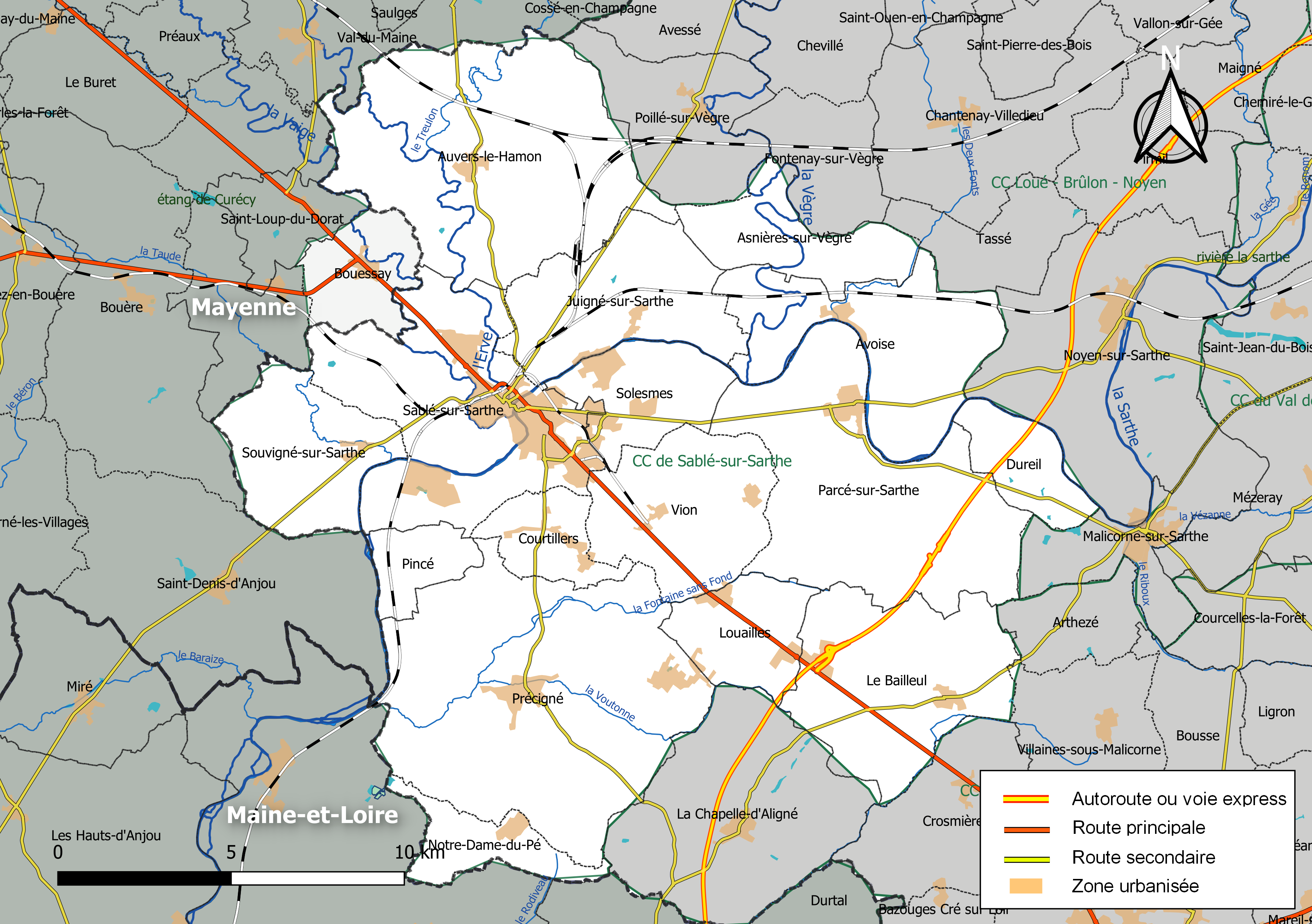 Carte géographique de la Communauté de communes de Sablé-sur-Sarthe, département de la Sarthe, France. Composition au 1er janvier 2019.